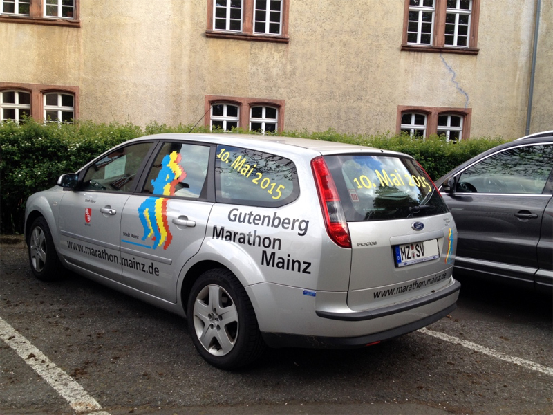 Fahrzeug der Stadtverwaltung Mainz mit Werbung für den Gutenberg-Marathon 2015